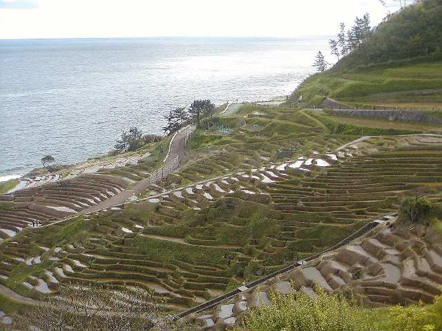 撮影者による投稿 Shiroyone Senmaida, Wajima, Ishikawa, Japan 輪島市白米千枚田